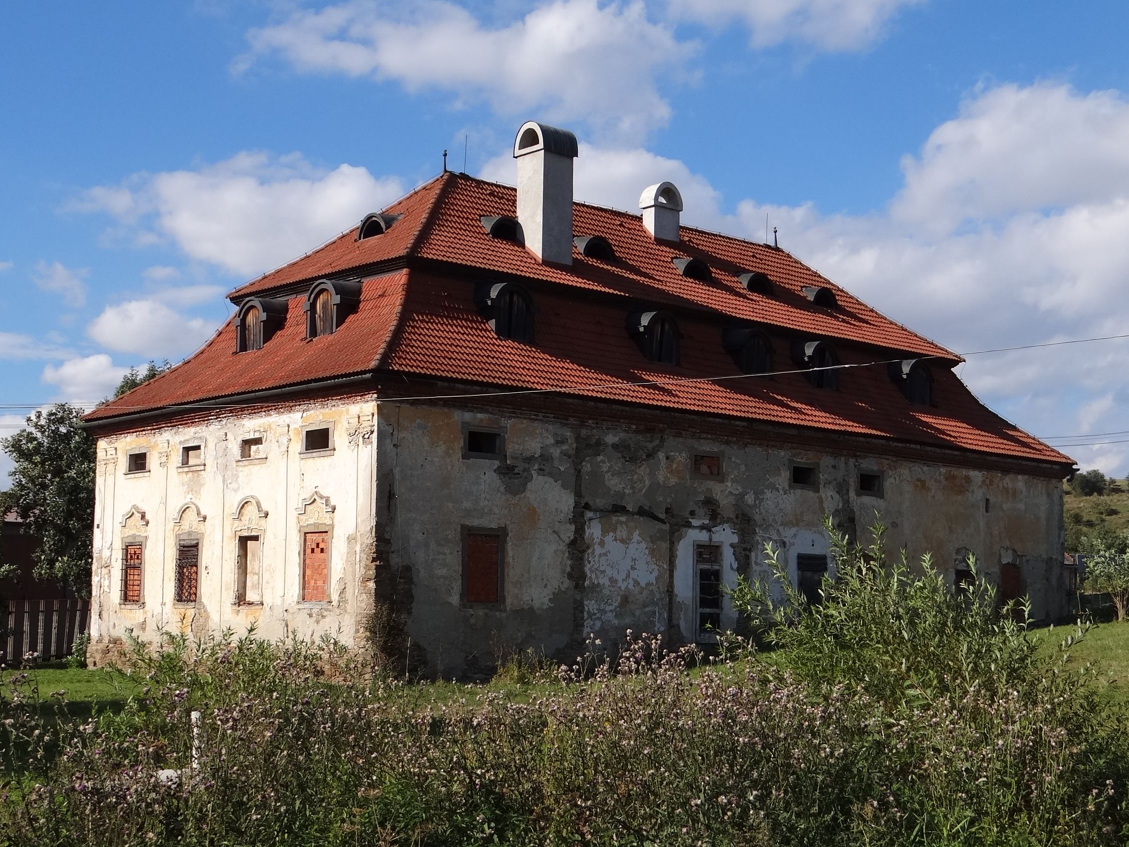 Neskorobarokový kaštieľ vo Vlkovej je východným susedom staršieho renesančného kaštieľa